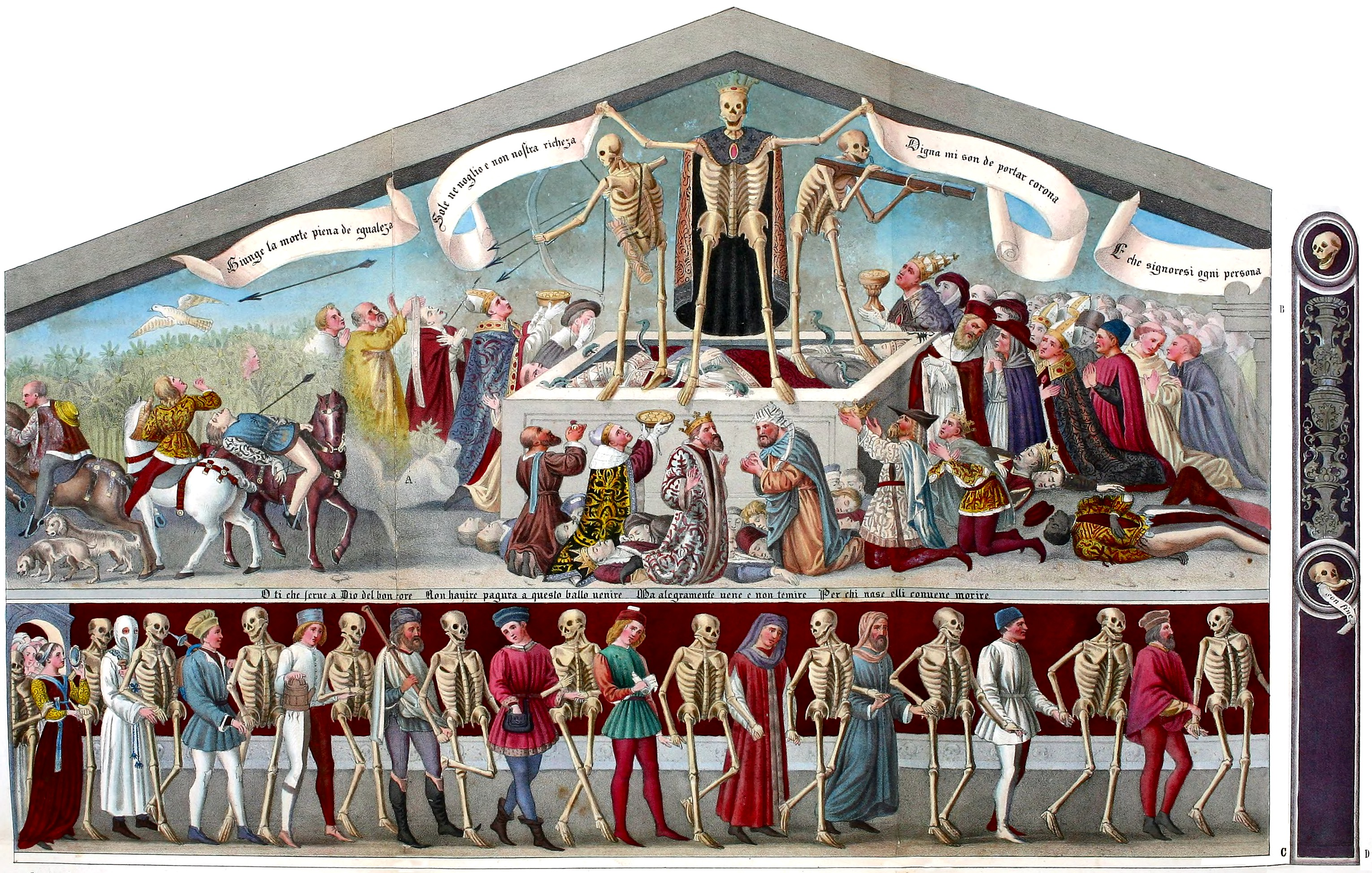 mmagine dal libro Trionfo e Danza della Morte, o Danza Macabra a Clusone. Dogma della Morte a Pisogne, nella provincia di Bergamo, con osservazioni storiche ed artistiche